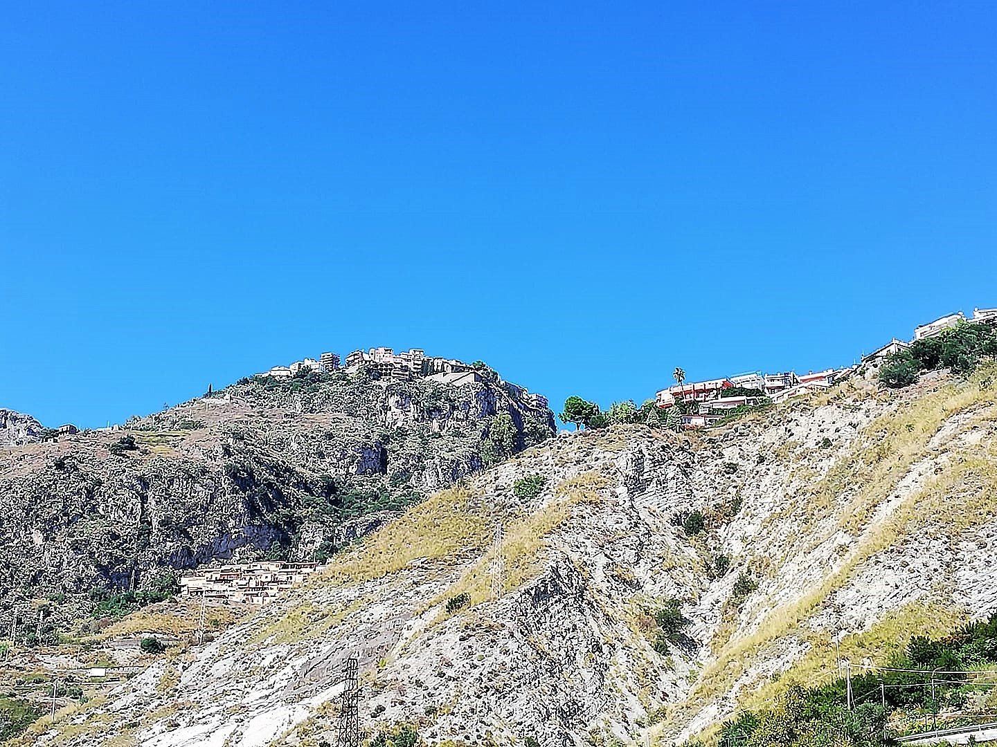 Veduta di Castelmola dalla salita Ospedale San Vincenzo per Taormina, ore 14:58 circa.